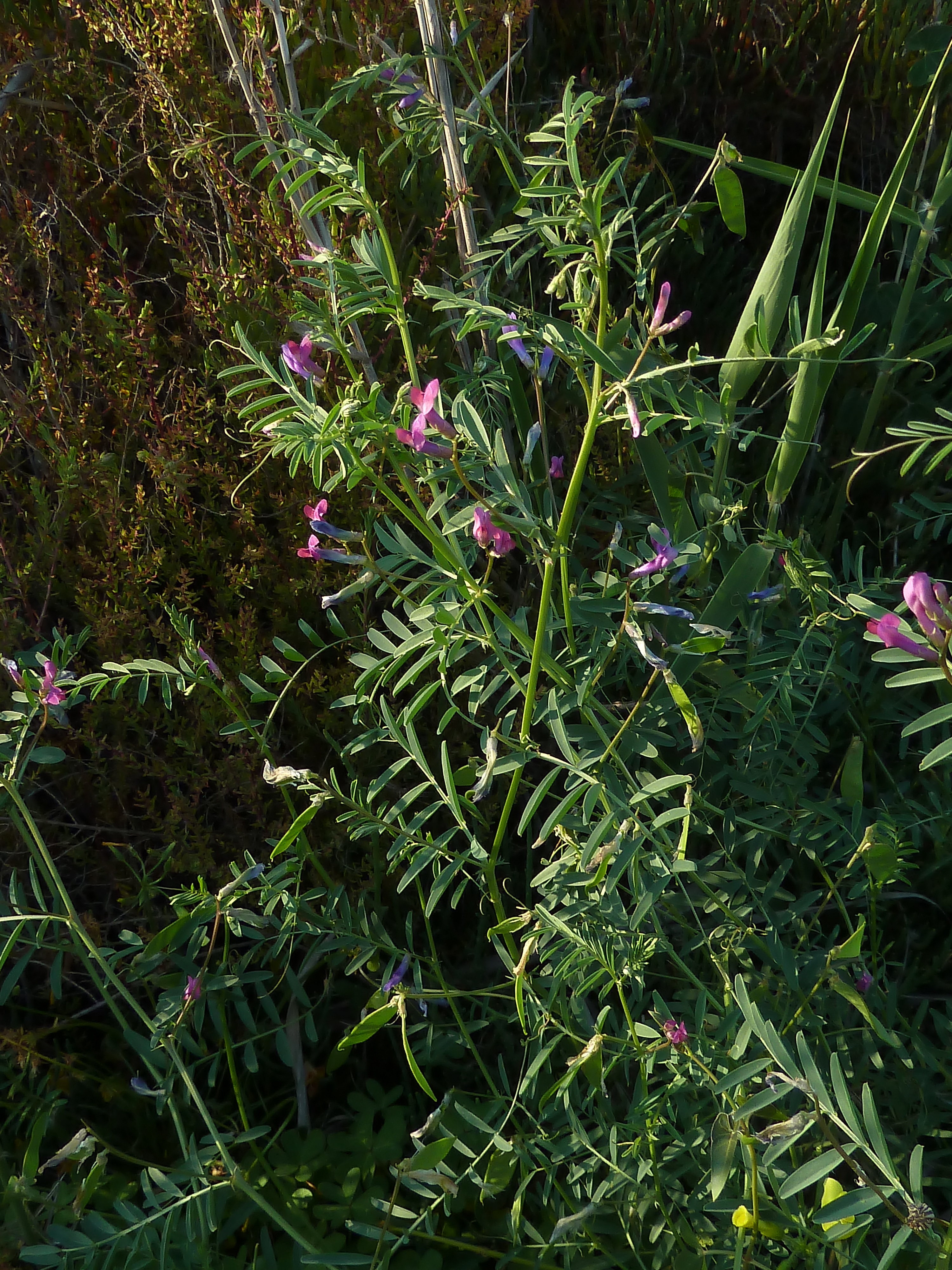 Vicia monantha (Algarroba) - Vista general. - Camino del Canalillo, Albatera (Provincia de Alicante, España).